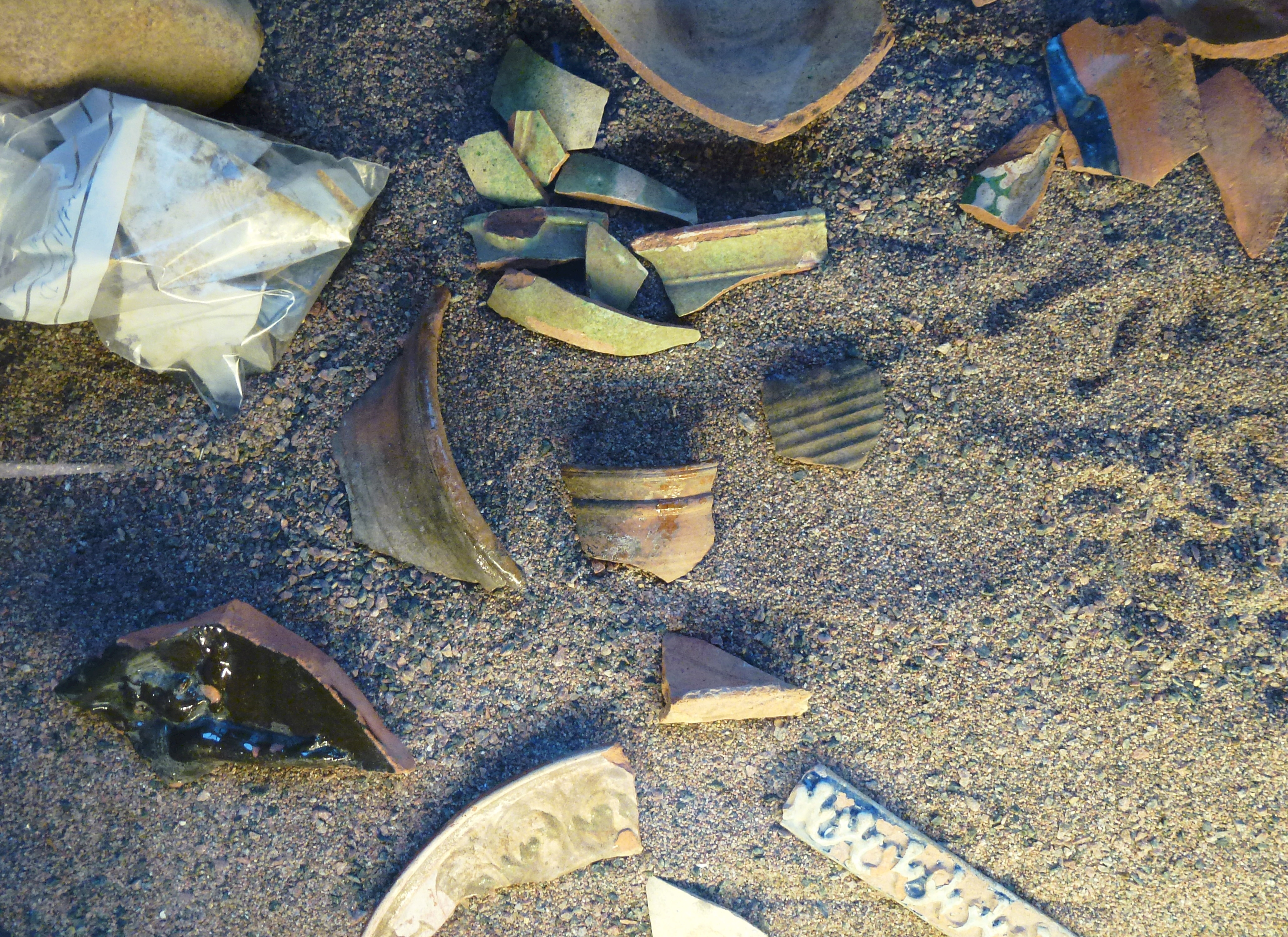 Utgrävningar på Brunnsbacken, Stockholm, funna föremål på Stockholms stadsmuseum